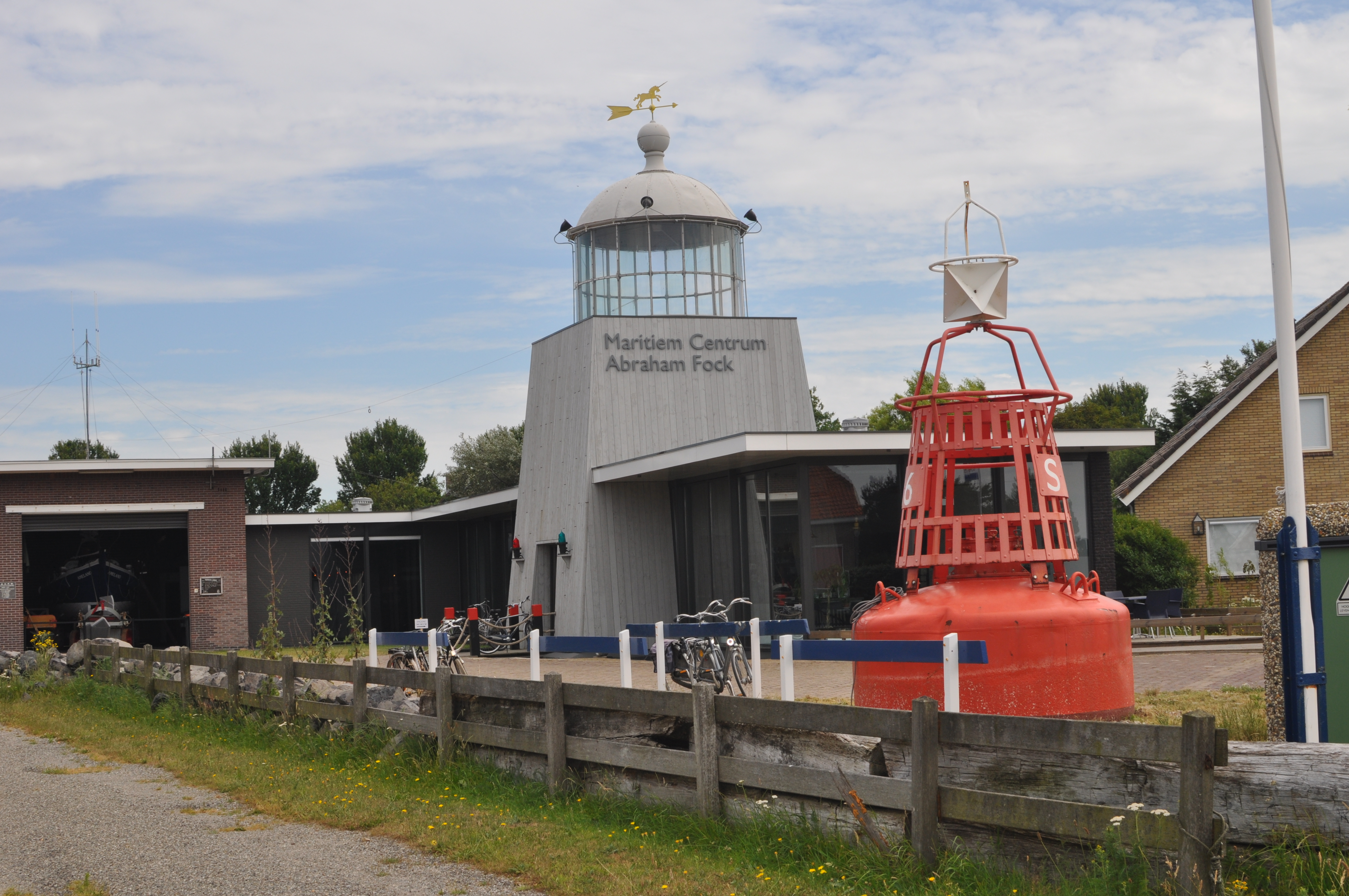 Alte Kanzel des Ameländer Leuchtturms Bornrif auf dem Hollumer Reddingsmusem